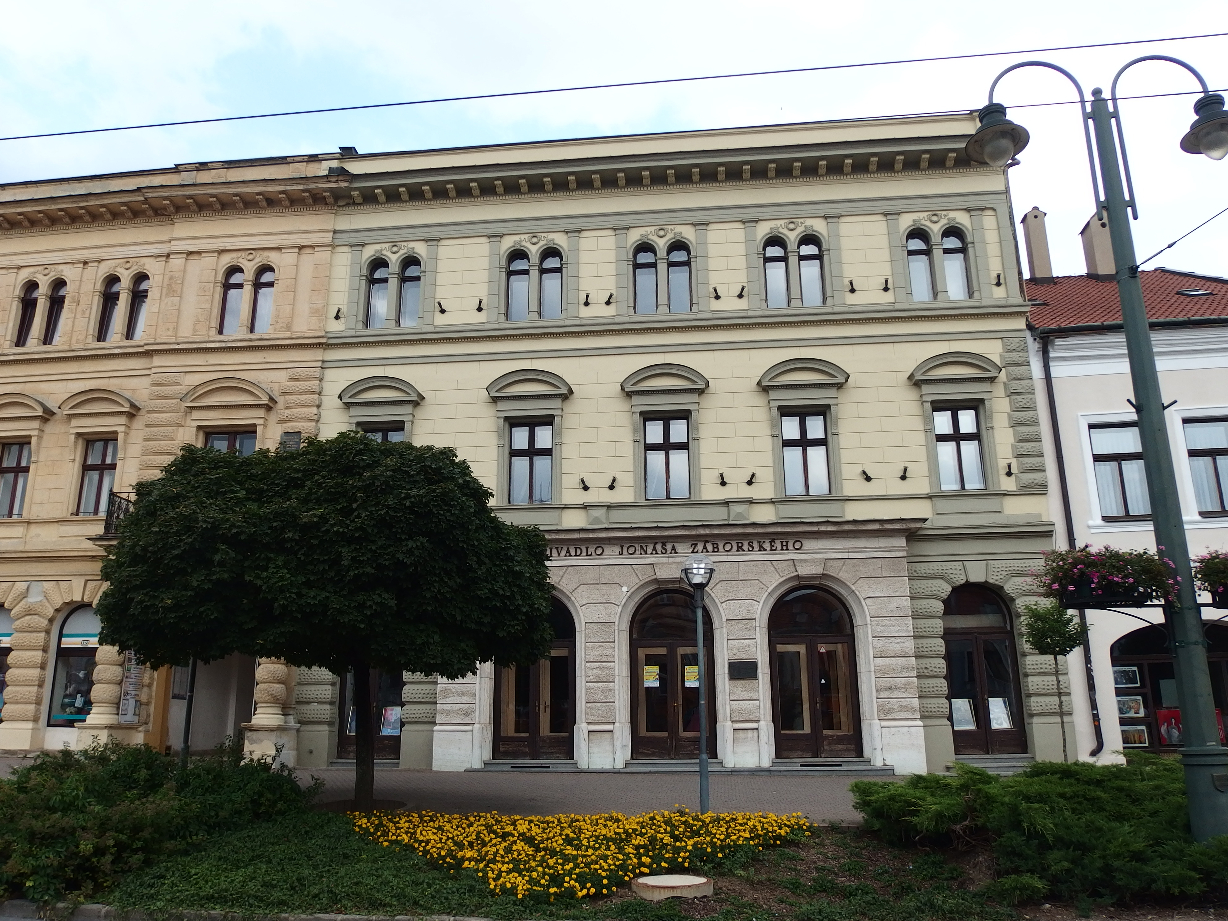 Prešov, Divadlo Jonáša Záborského, historická budova.